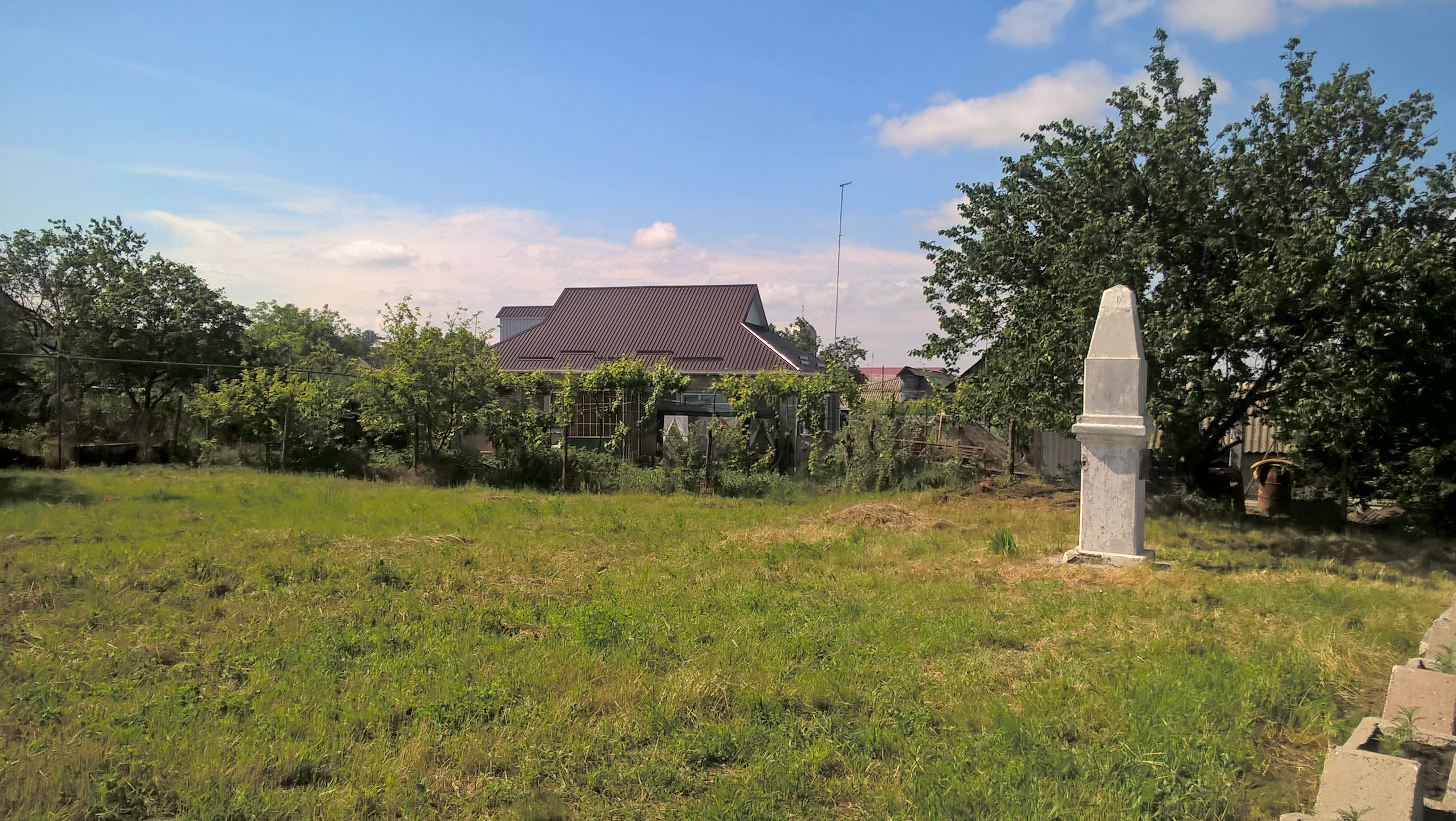 Miejsce, gdzie znajdował się dwór, gdzie po bitwie pod Połtawą żył król szwedzki Karol XII